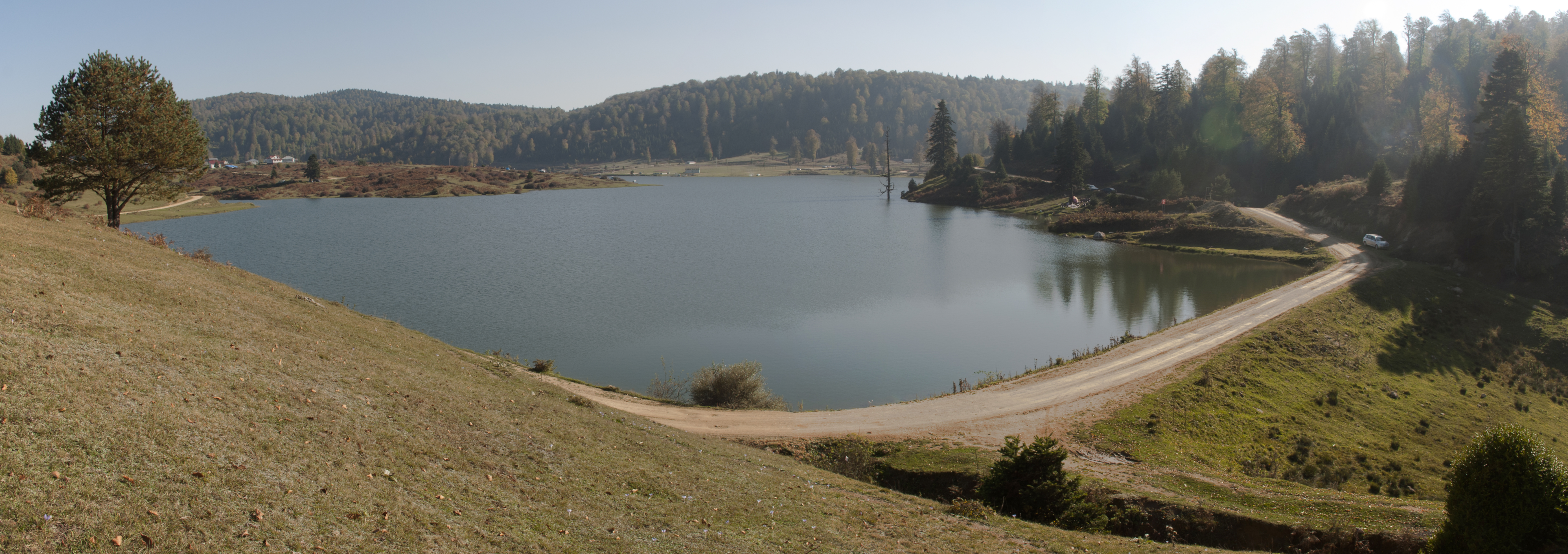 Sakarya ili, Akyazı ilçesi, Acelle Yaylası gölü.